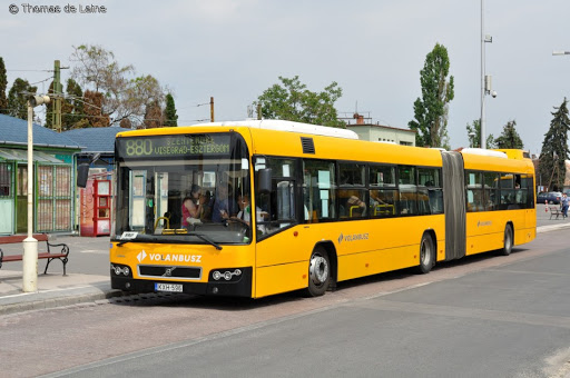 Volvo 7700A, 2020 február